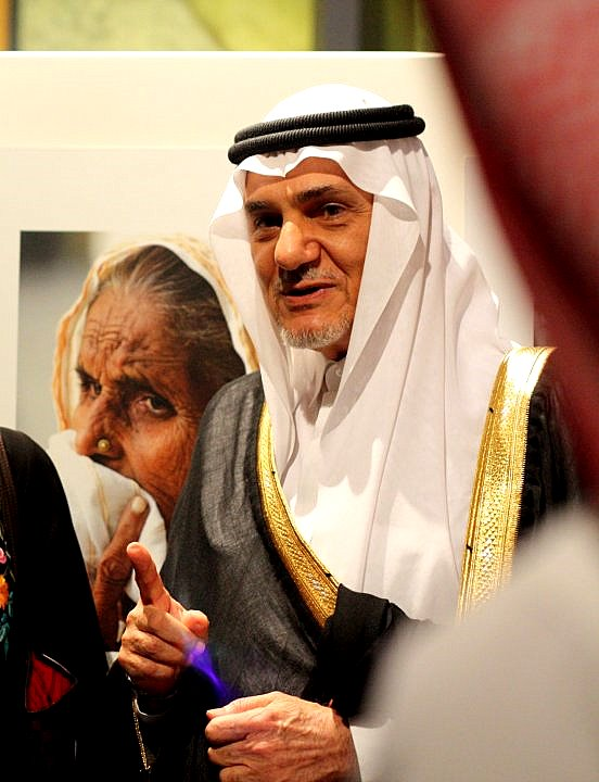 Prince Turki bin Faisal Al Saud.